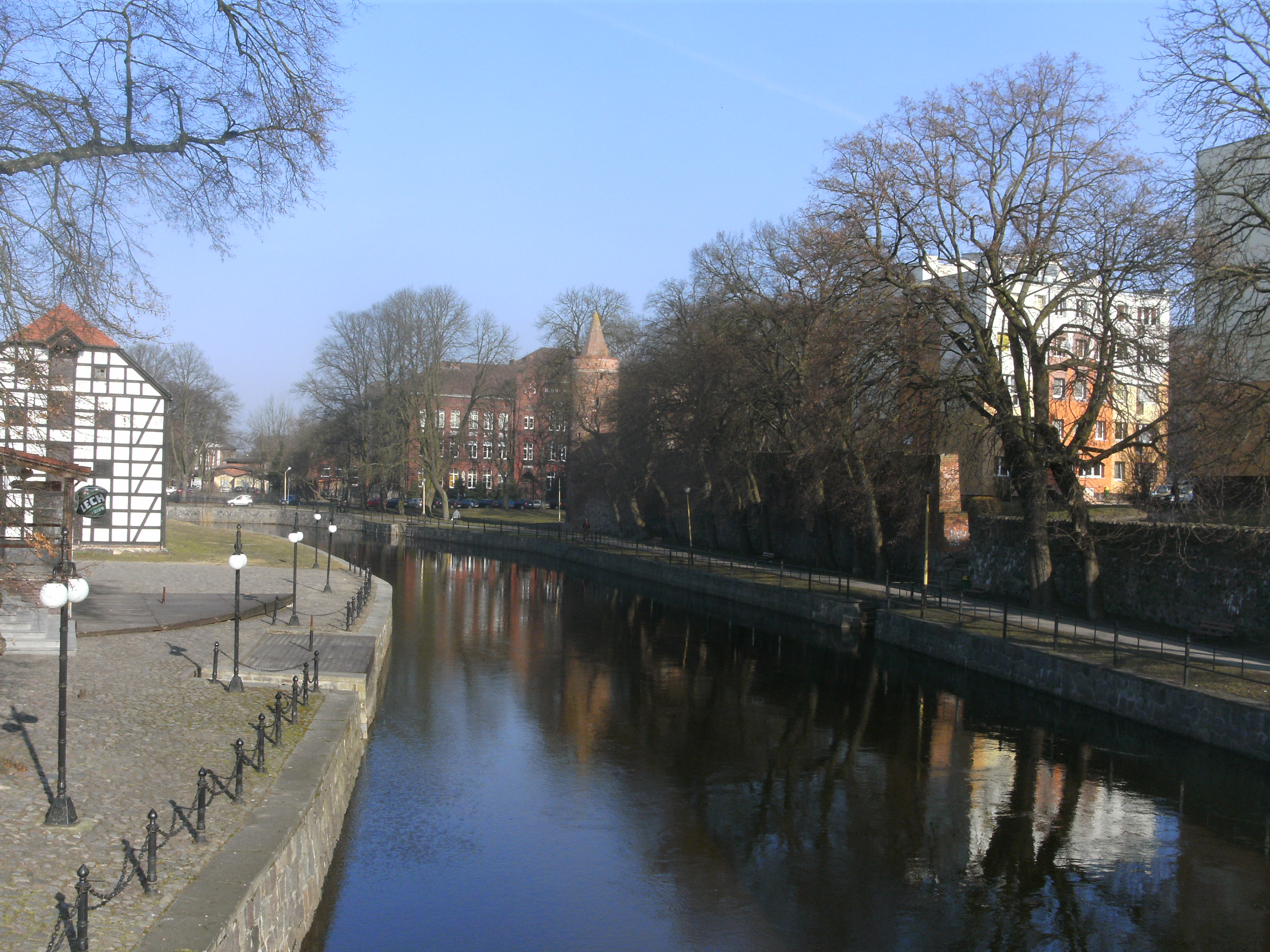 Gollnow in Hinterpommern, Blick von der Ihnabrücke im Stadtzentrum in Richtung der Ruine der mittelalterlichen Stadtmauer (Mauer verläuft rechts parallel zur Ihna)